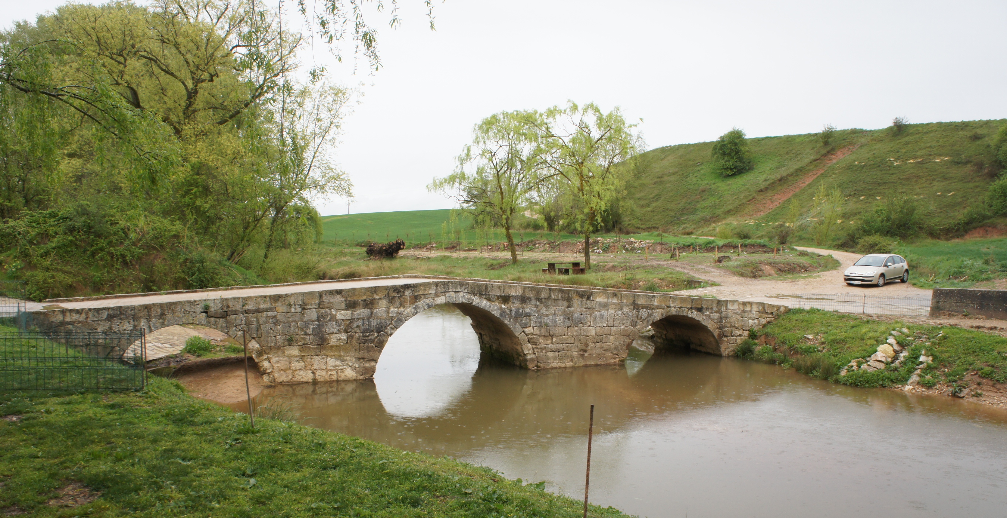 Puente medieval sobre el río Brullés.